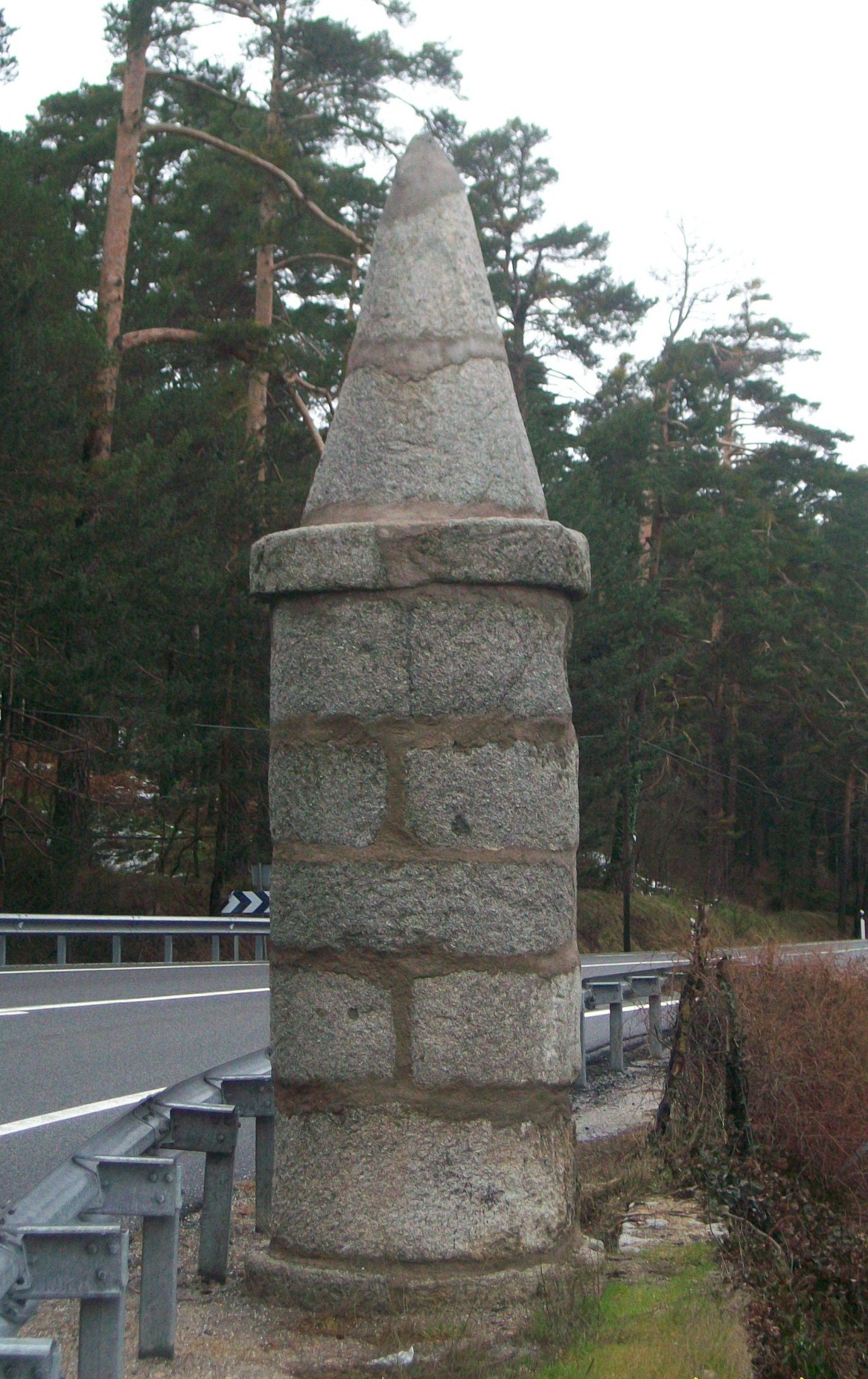 La foto muestra una de las miras de la localidad segoviana de San Rafael (España), las cuales son pináculos de piedra de cuerpo circular y cabeza triangular que se posicionaron en la antigua carretera del S. XVIII (hoy es la carretera N-6) con el objetivo de señalizar pasajes de la calzada que la nieve podía hacer dudosos. Aún perduran hoy en día desde la bajada del puerto de Guadarrama por la vertiente segoviana hasta casi llegar a la localidad de Villacastín. Son indudablemente los elementos emblemáticos del paisaje urbano de San Rafael, símbolo por excelencia de la localidad.